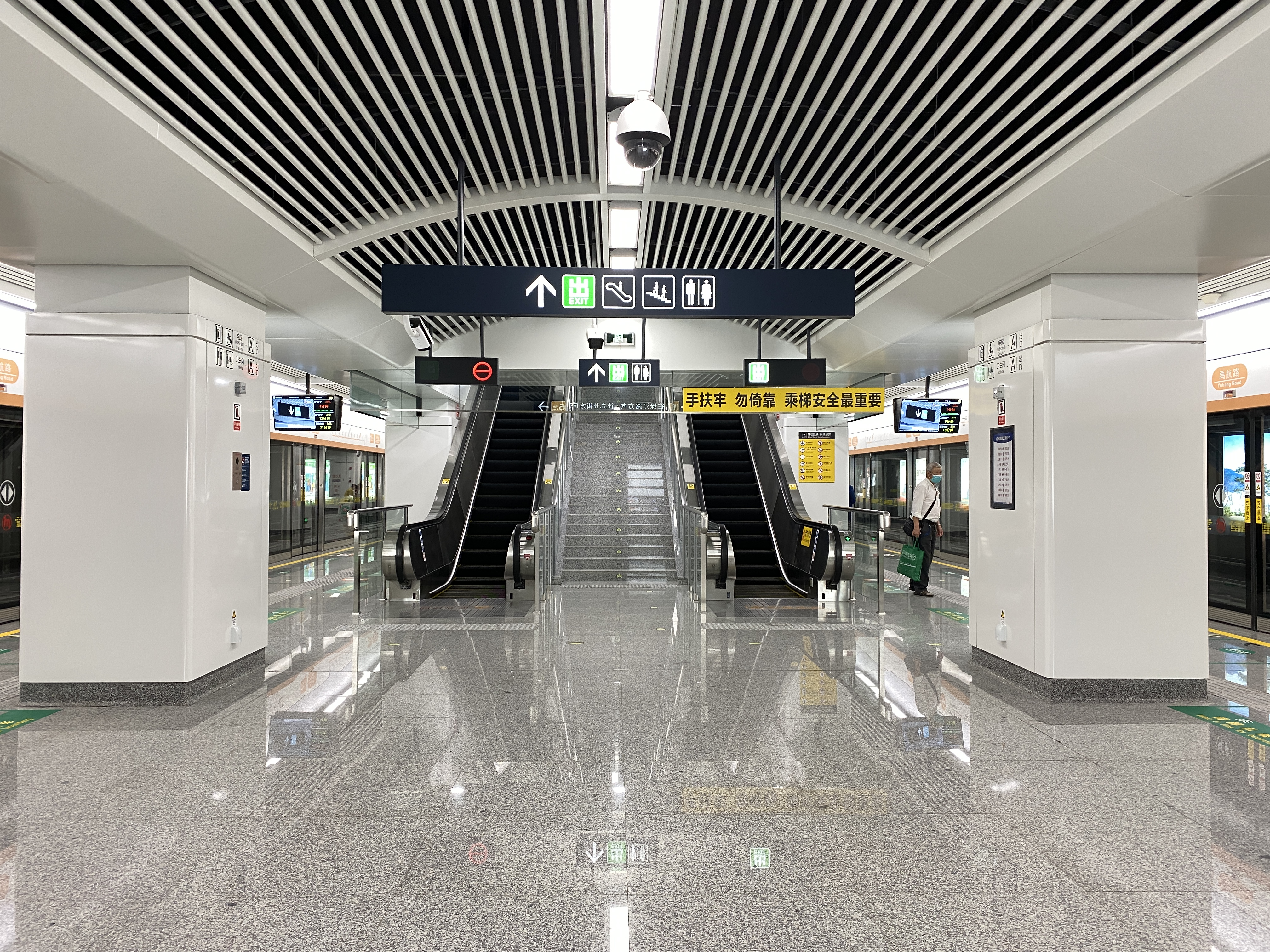 20200503禹航路站站台